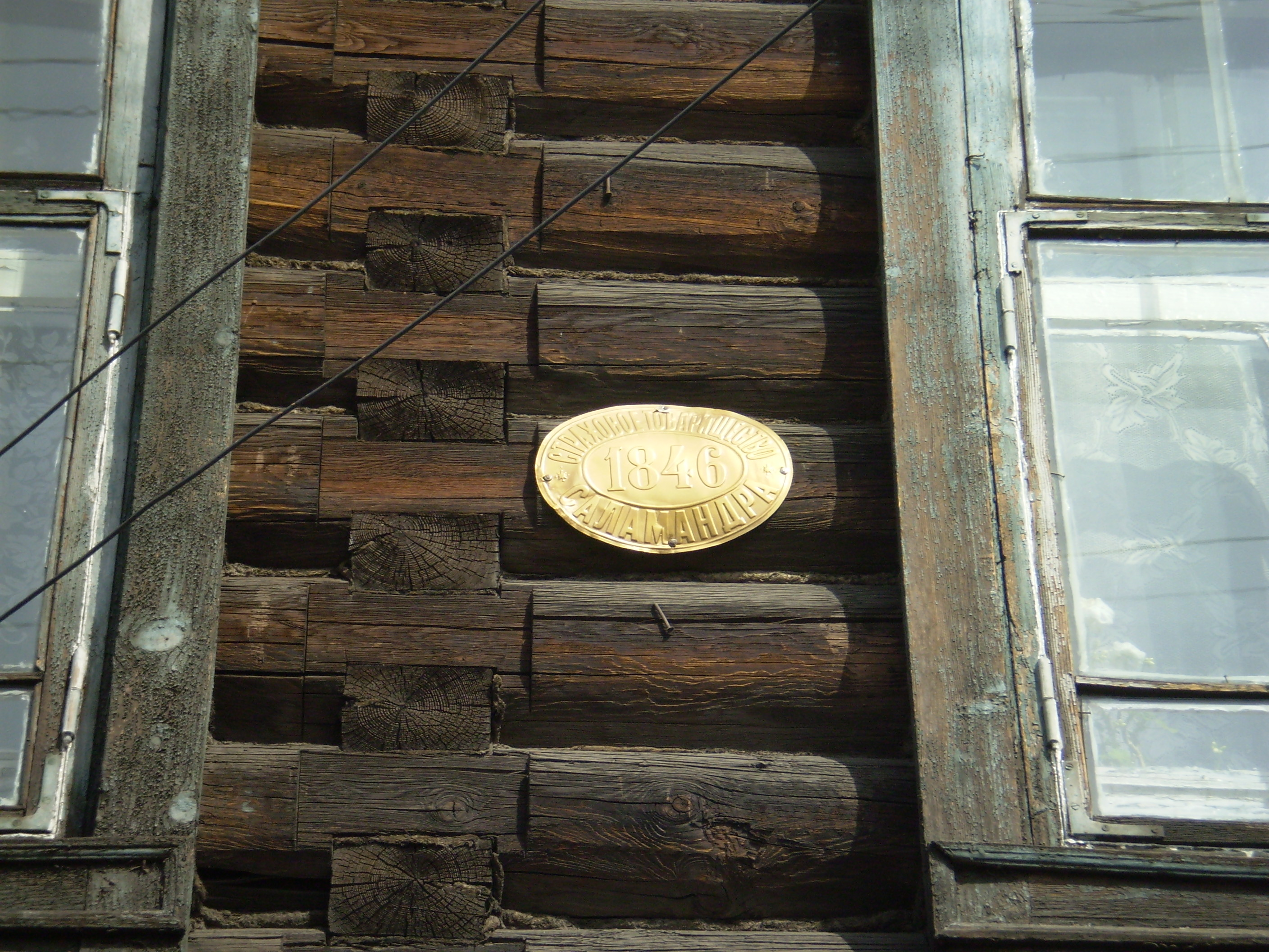 Табличка русского страхового общества "Саламандра". 1846 год. Ул. Банзарова, 19